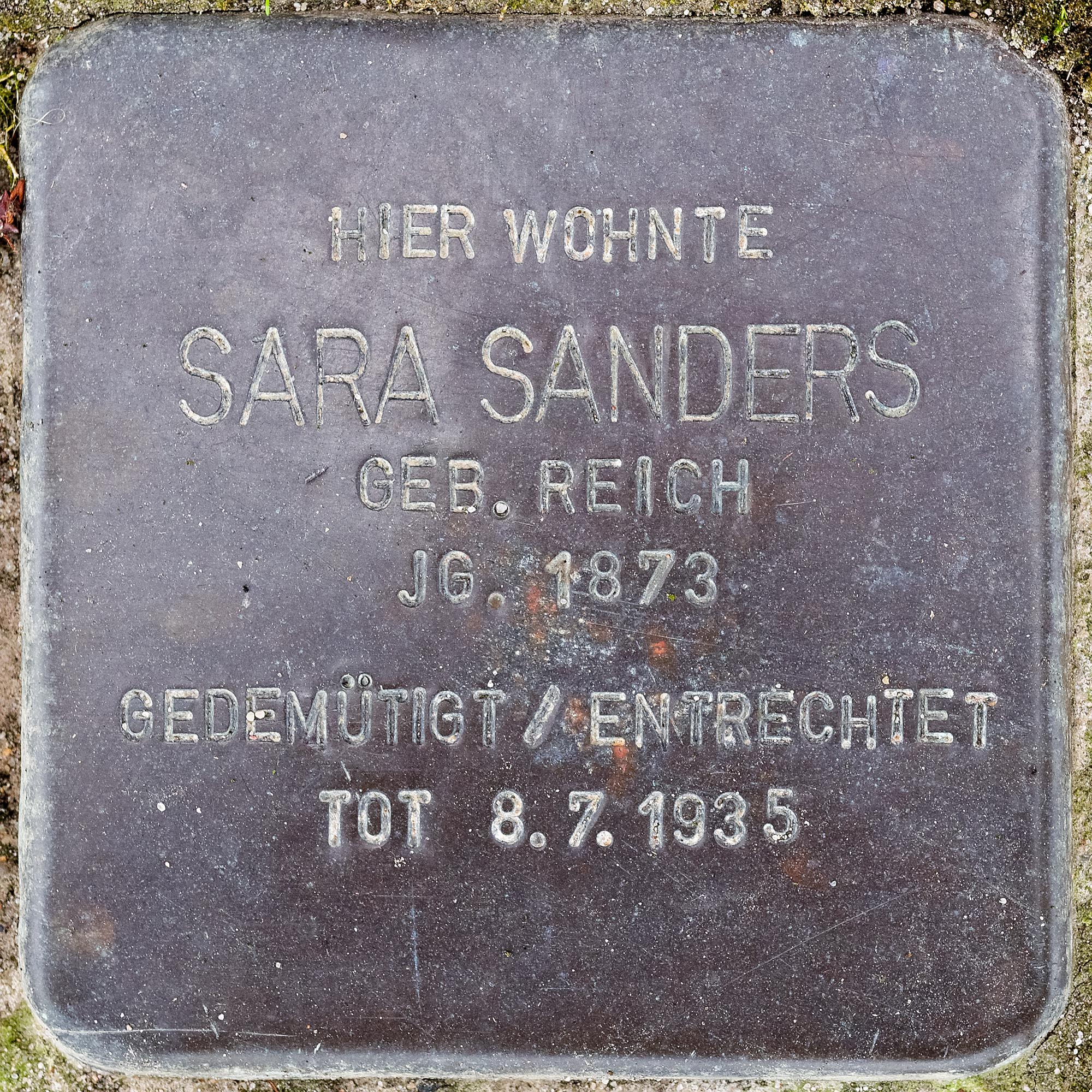 Stolperstein Sanders, Sara